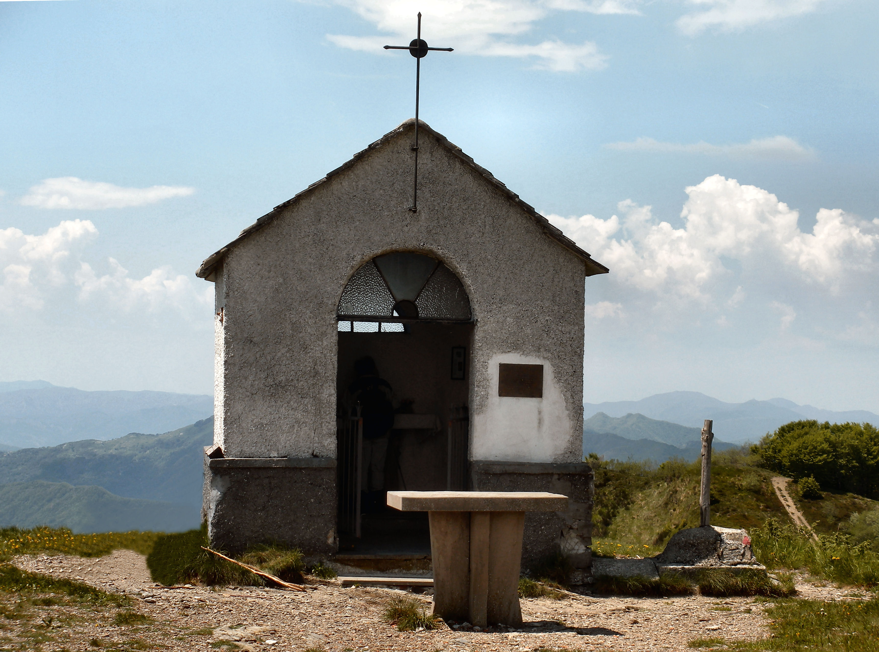 Cappelletta sul M. Caucaso (Val Fontanabuona, prov. Genova) Foto propria Maggio 2010